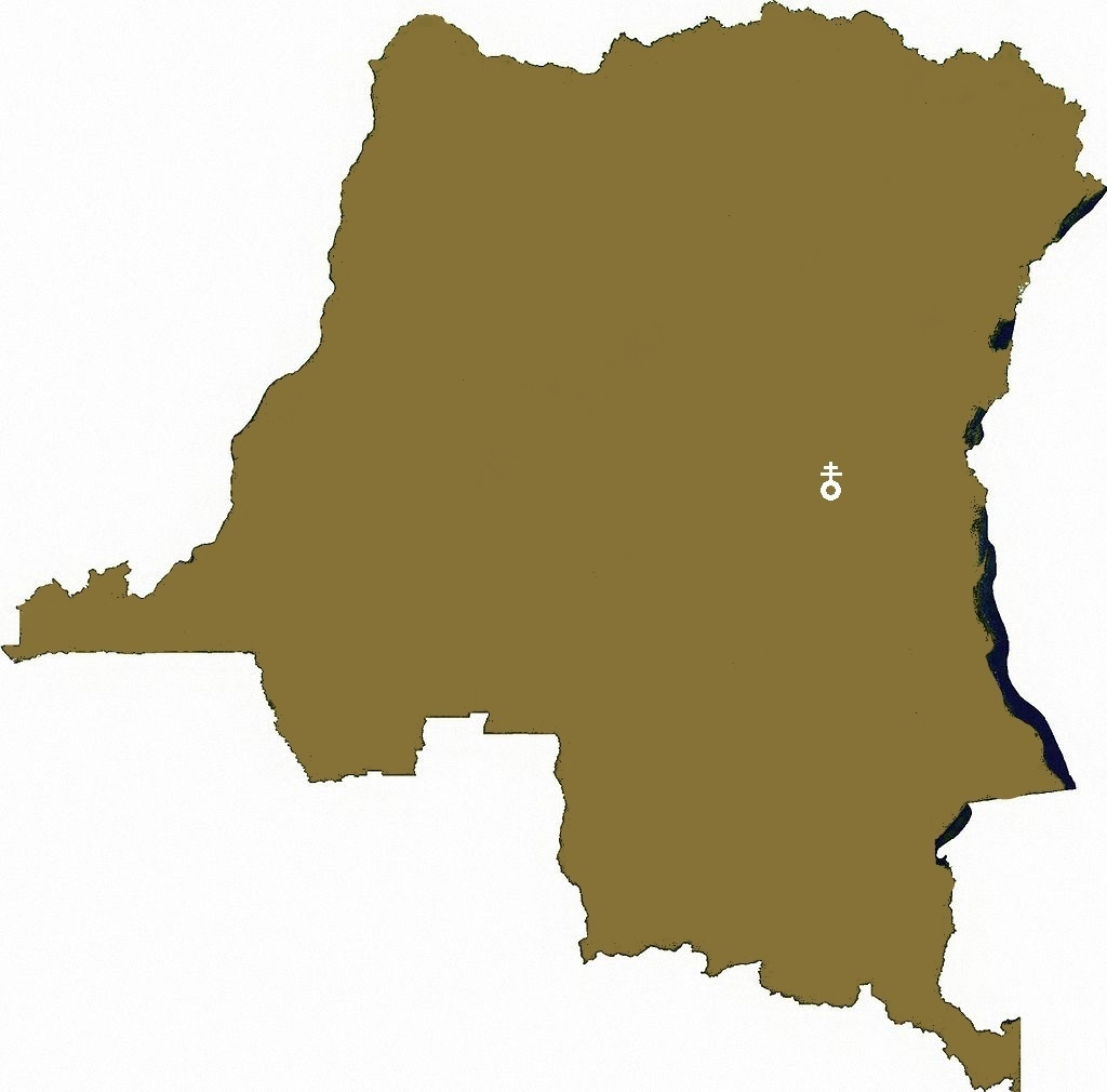 kaart congo